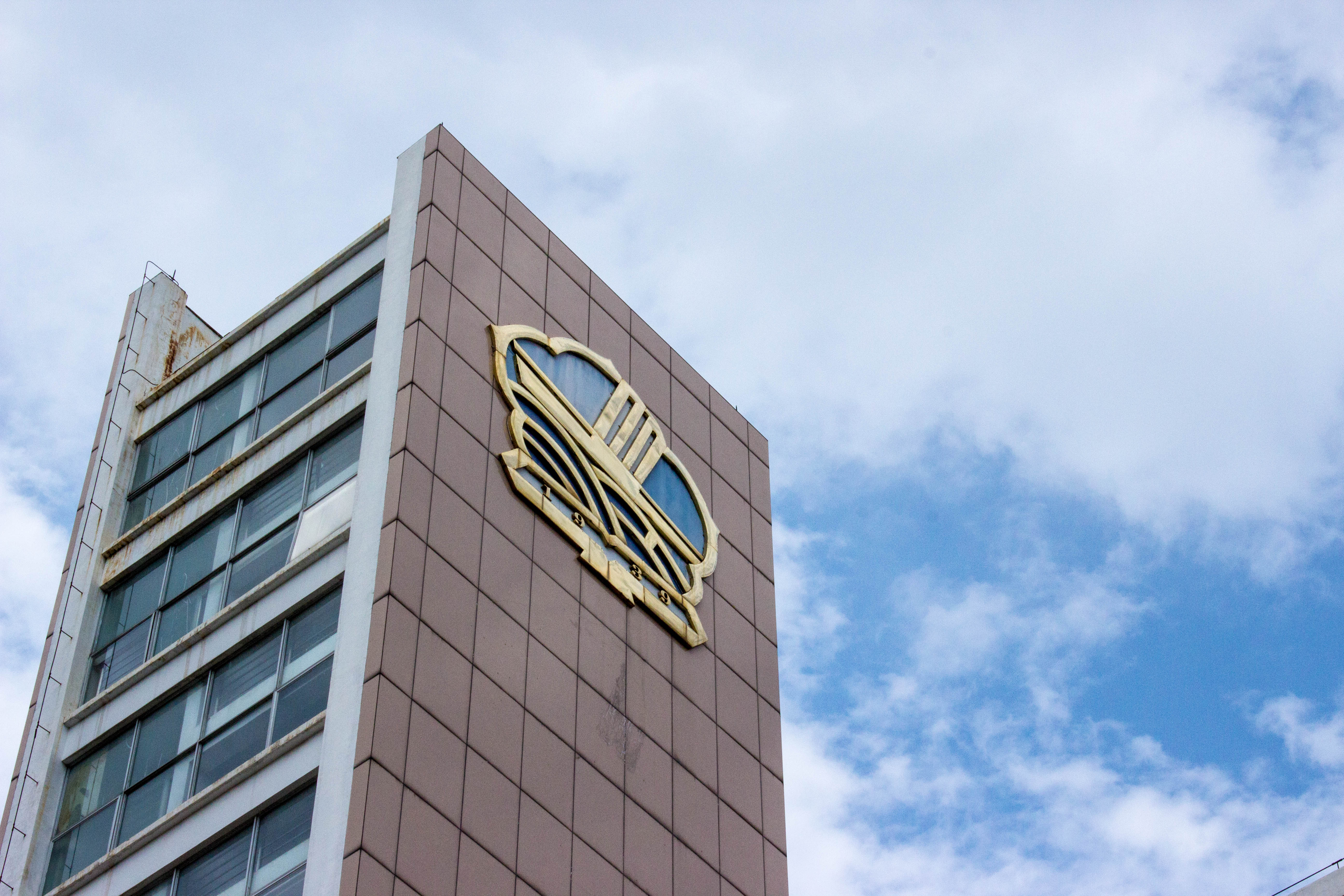 广东北江中学办公楼的照片